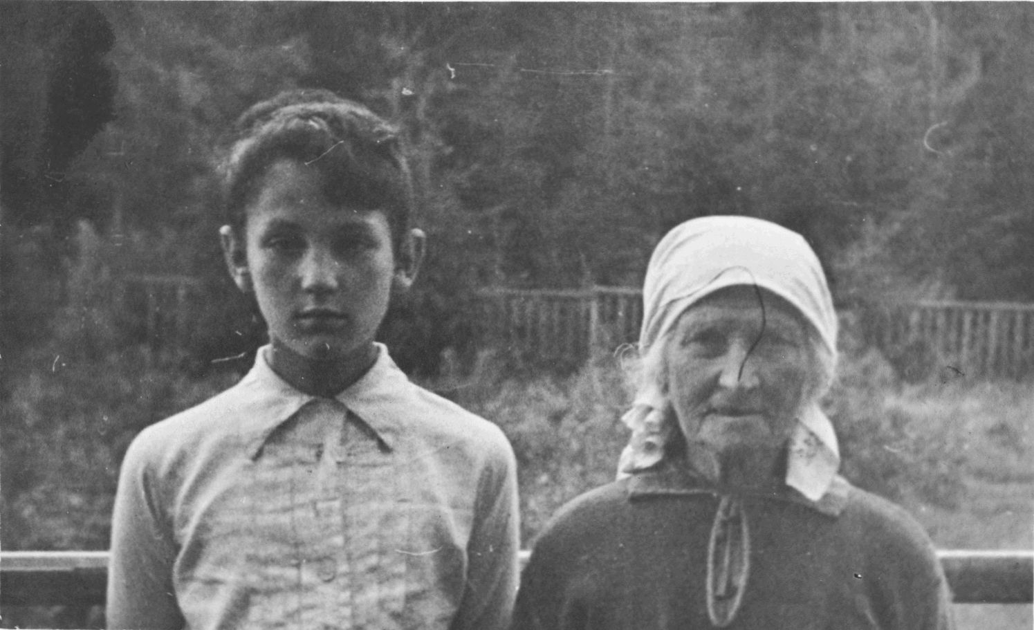 А.И.Зайцев с бабушкой А.М.Зайцевой